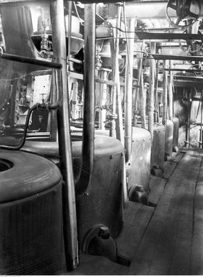 urządzenia cukrowni